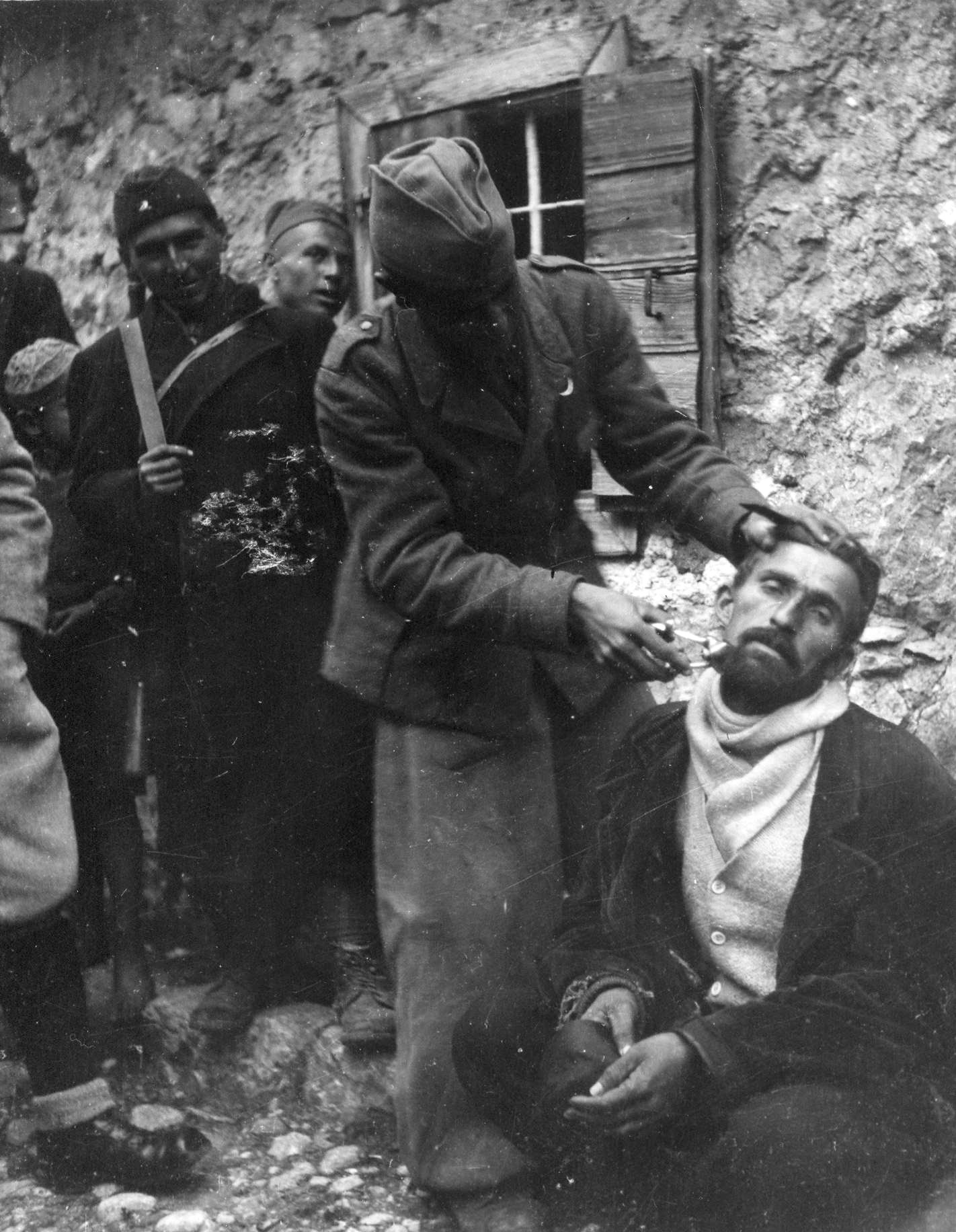 Srpskohrvatski / српскохрватски: Partizani šišaju i briju zarobljene četnike, koji su potom pušteni na slobodu, u Bosni i Hercegovini 1943. godine.